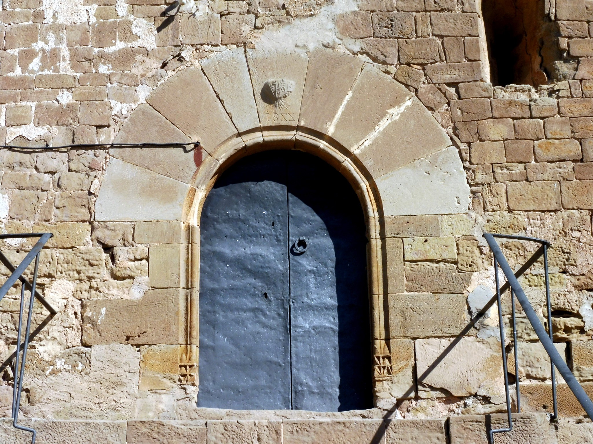 Esglesia parroquial de Santa Maria de Coscó (Oliola): portal